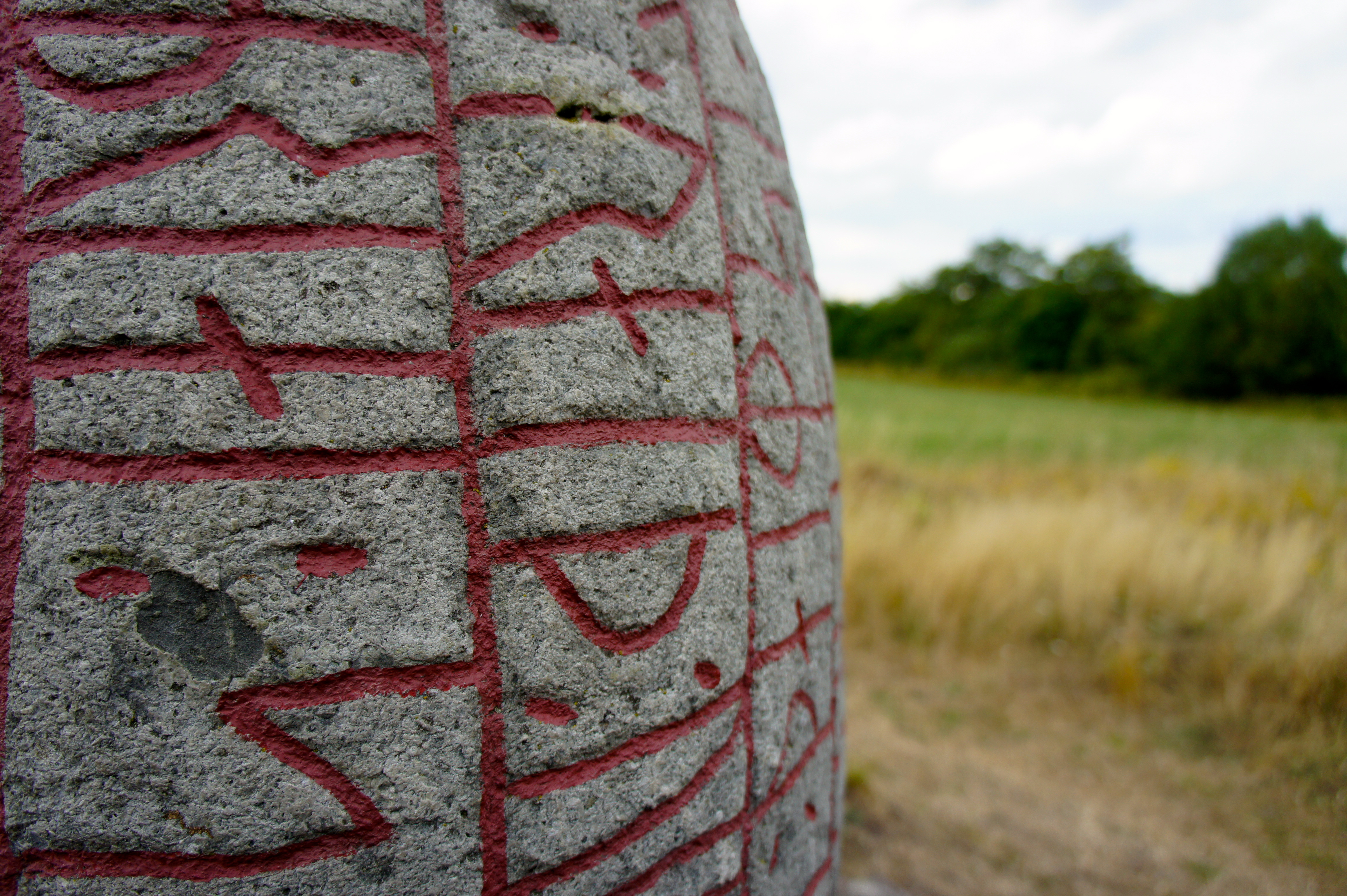 Karlevistenen (Öl 1) på Öland.